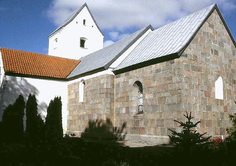 Kousted Kirke i Danmark. Kousted kirke